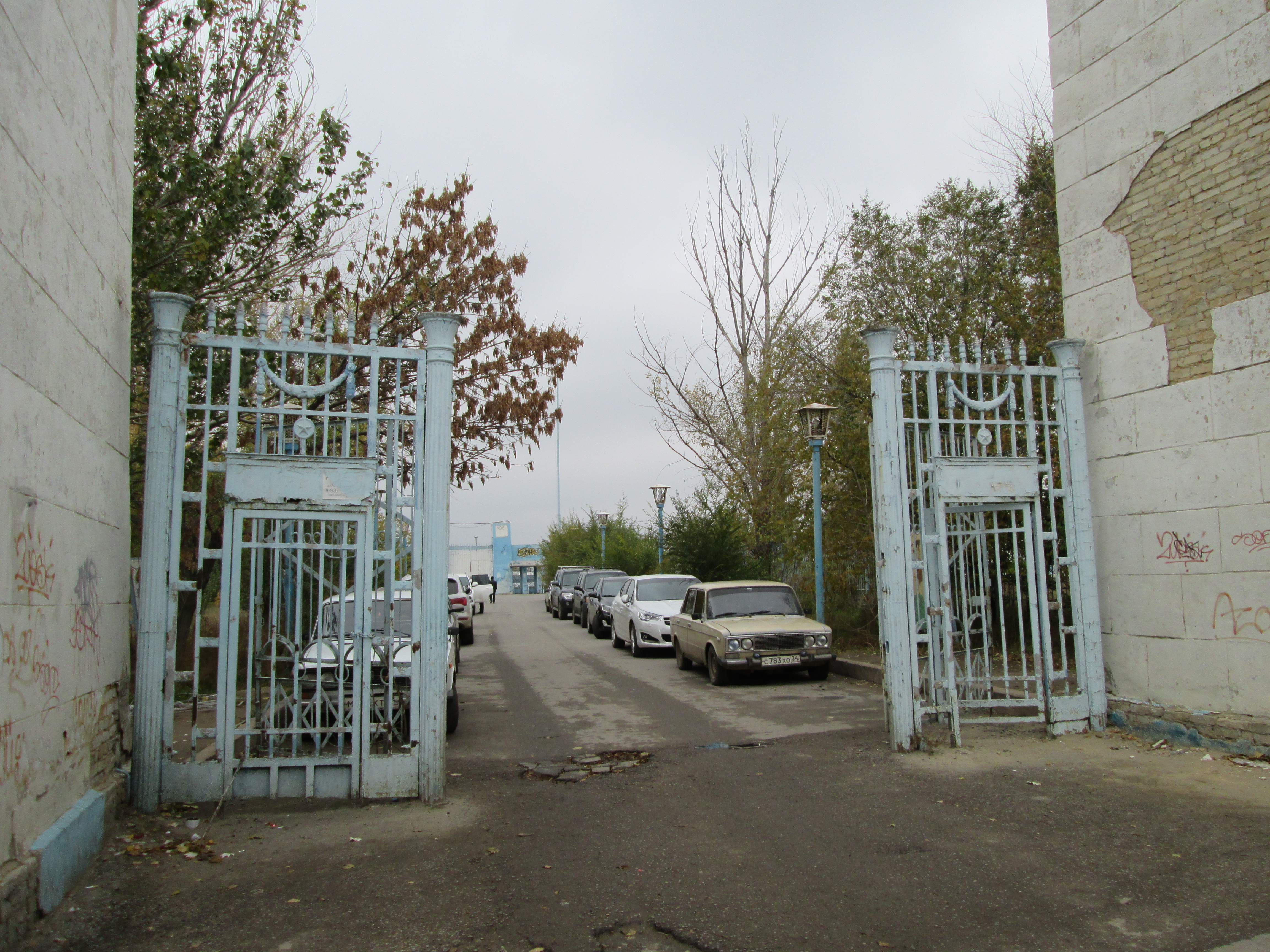 Проходные стадиона СТЗ/ВГТЗ/"Трактор"